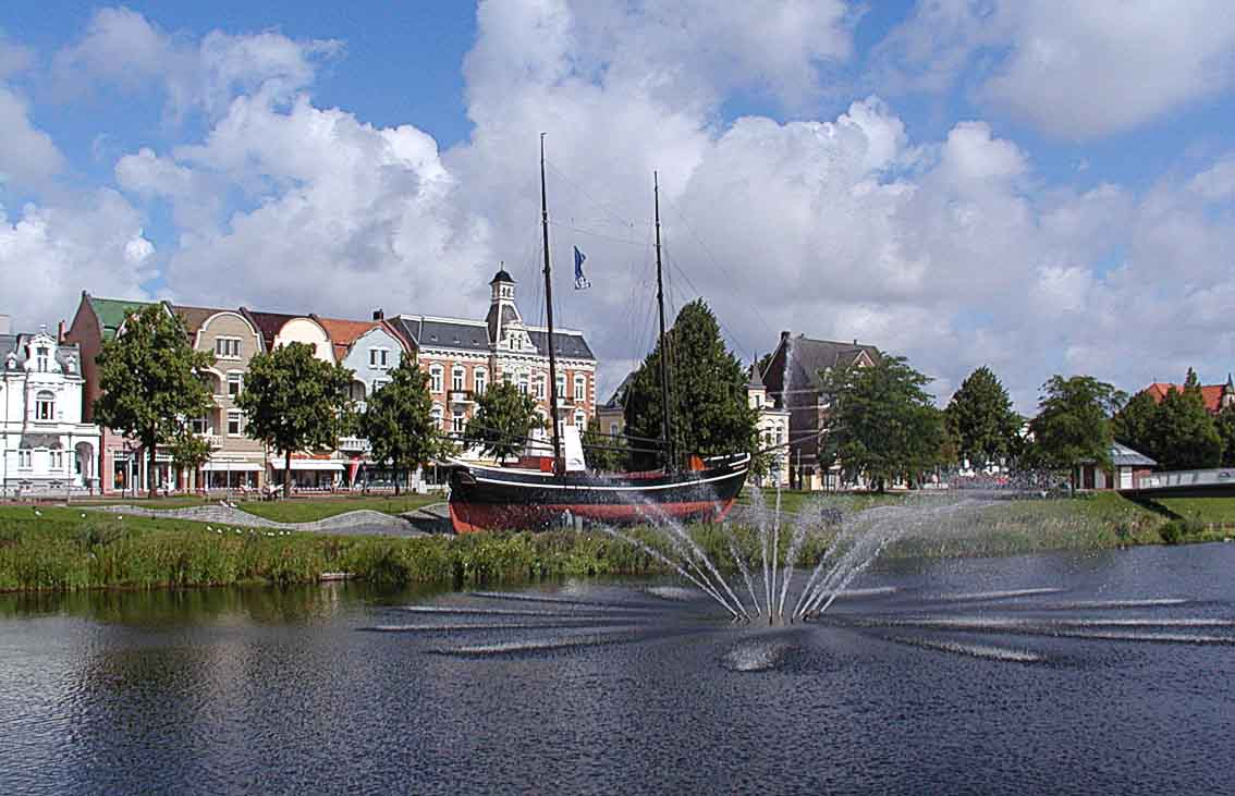 Der See in der Stadt